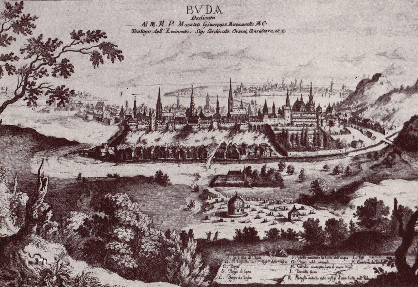 Buda Matthäus Merian 17. századi metszetén